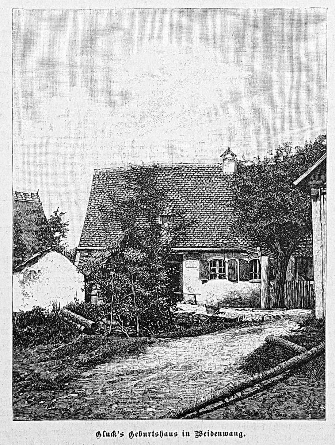 Bild aus Seite 765 in "Die Gartenlaube". Image from page 765 of journal Die Gartenlaube, 1887.